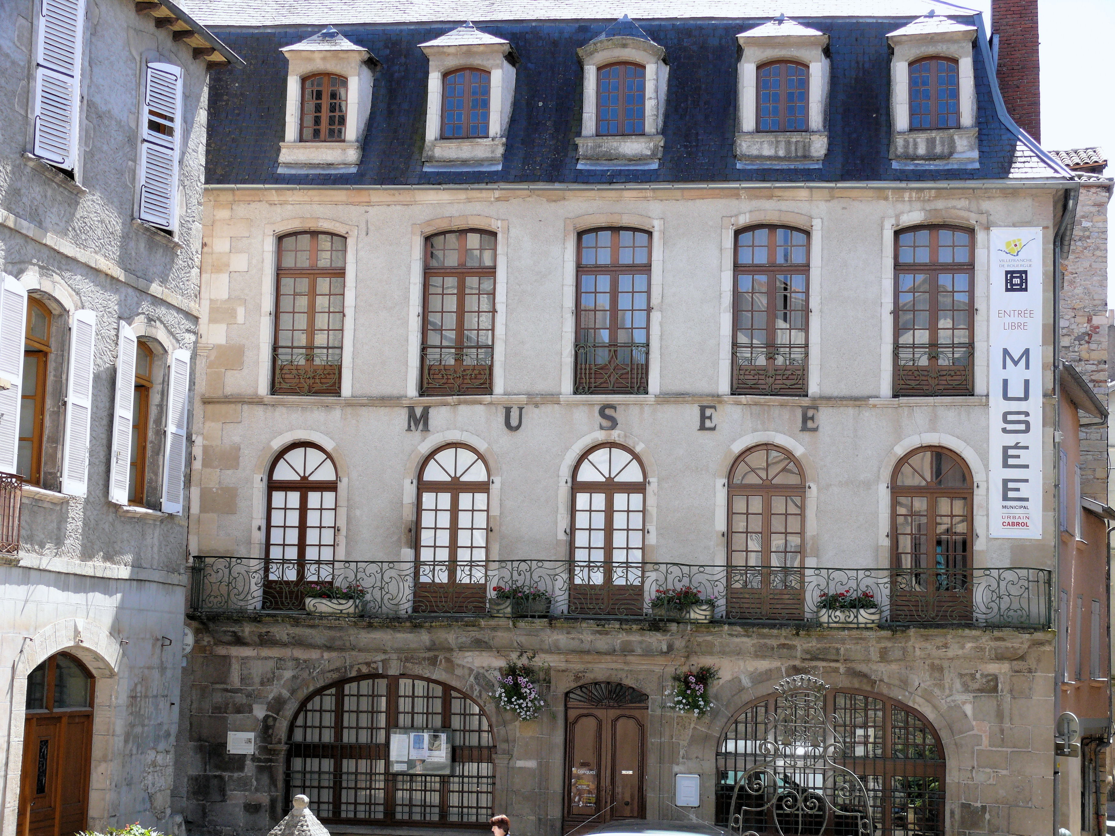 Villefranche-de-Rouergue - Musée municipal Urbain Cabrol